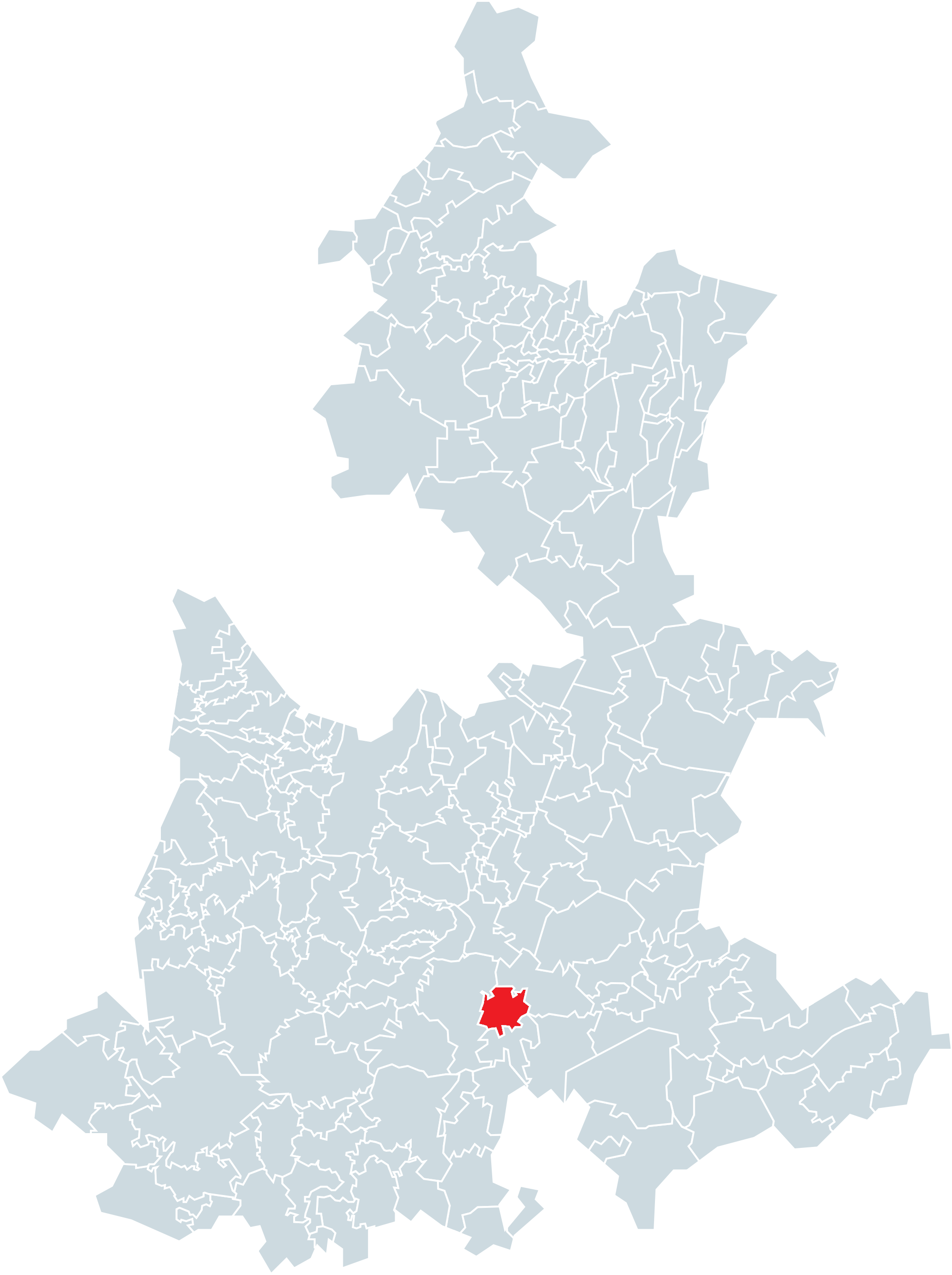 Municipio de Ixcaquixtla